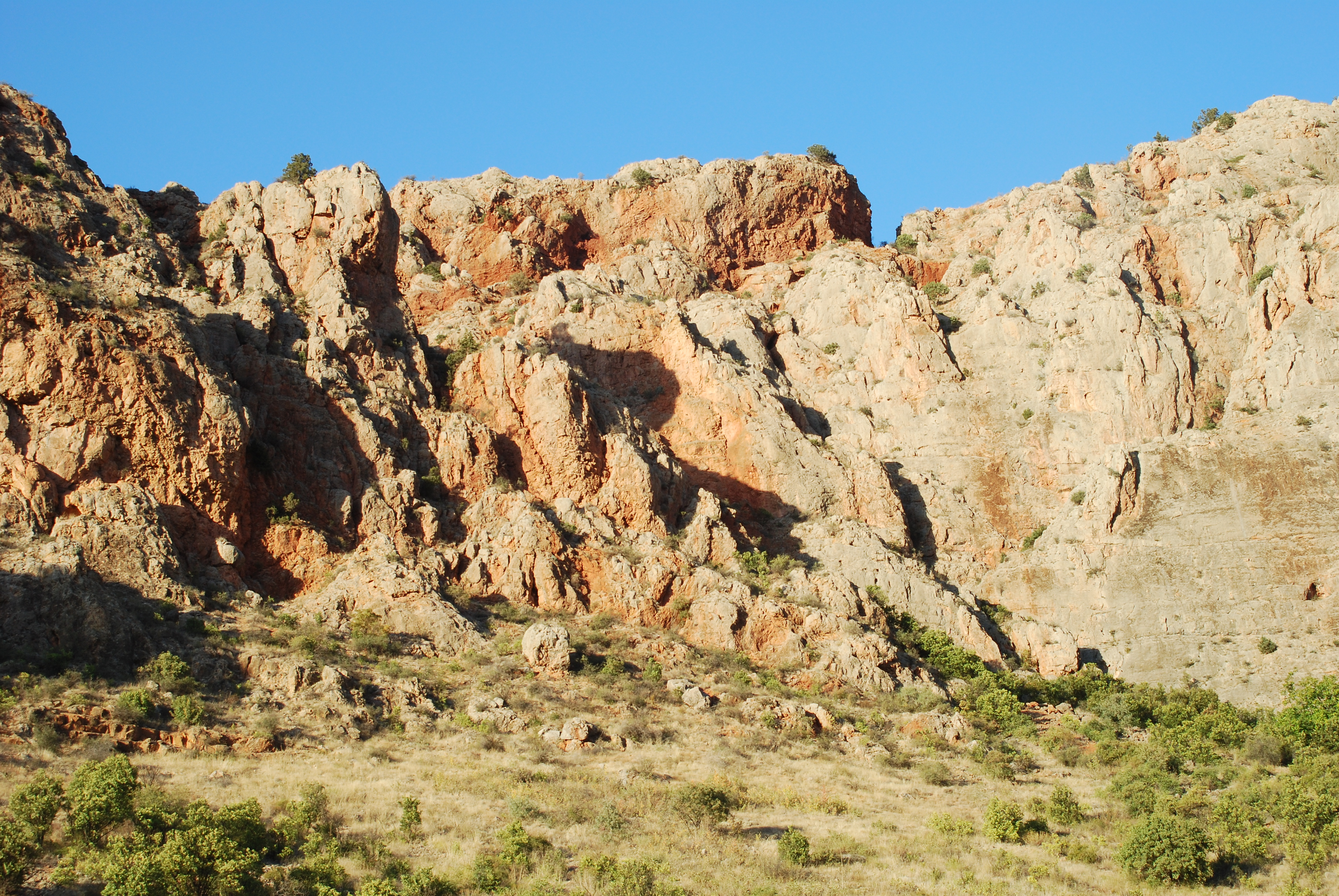 Vayots_dzor_near_Noravank